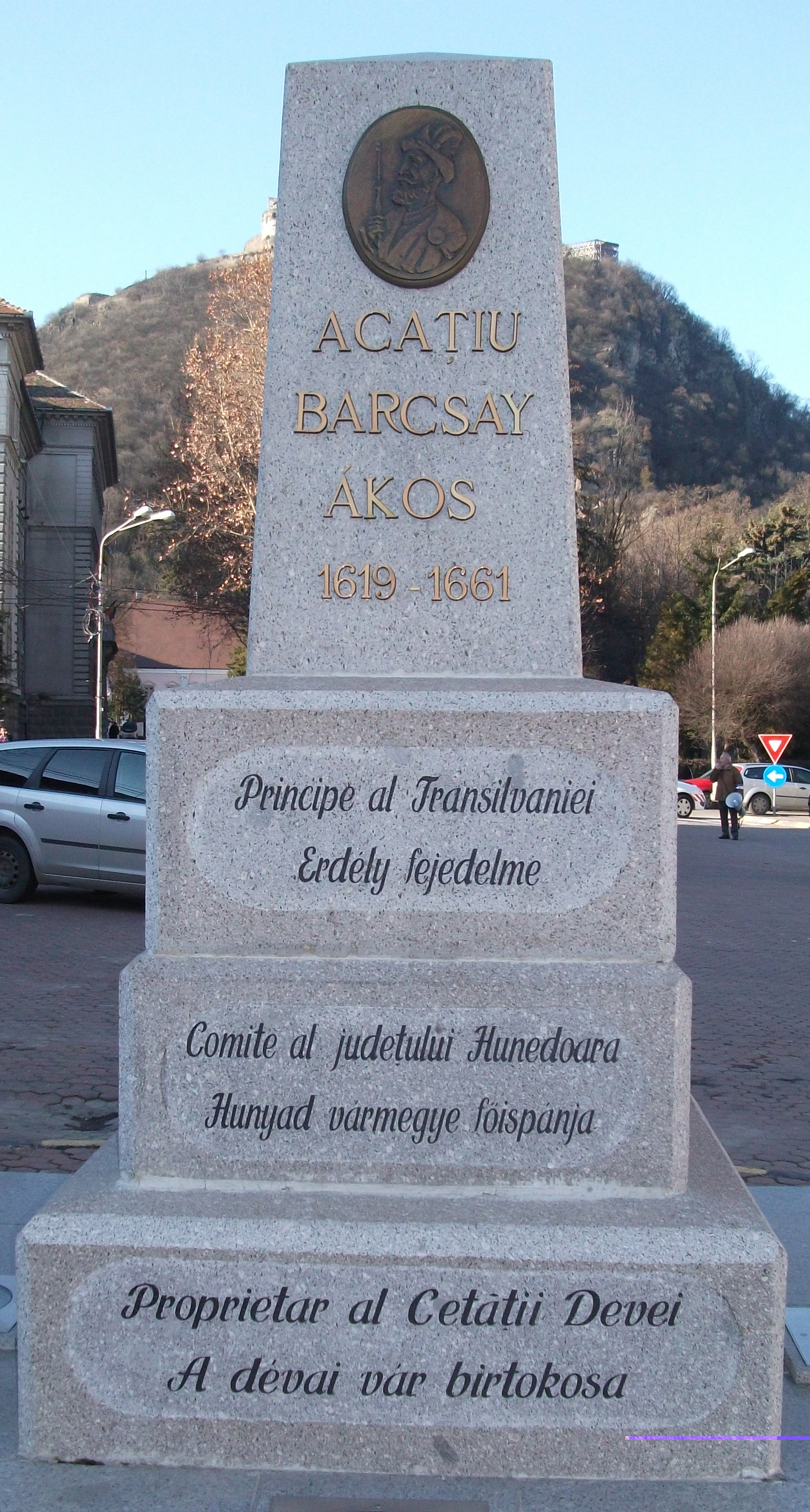 Barcsay Ákos emlékoszlopa a dévai vármegyeház előtti téren (Erdély)